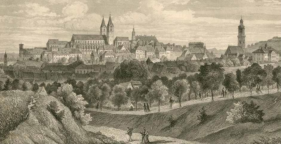 Freisinger Stadtansicht (nach der Säkularisation)